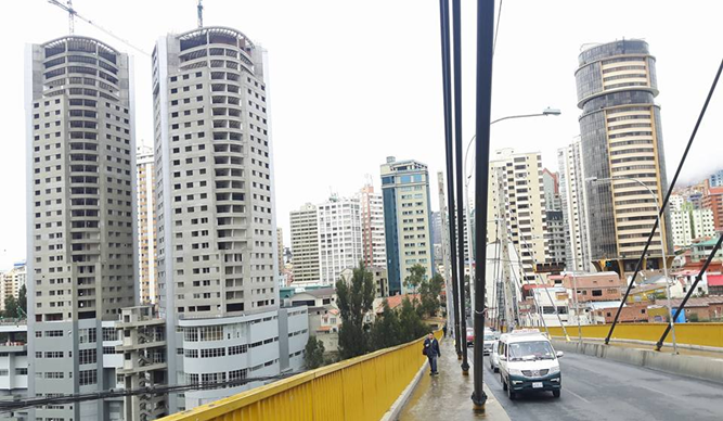 Vista del puente de la américas